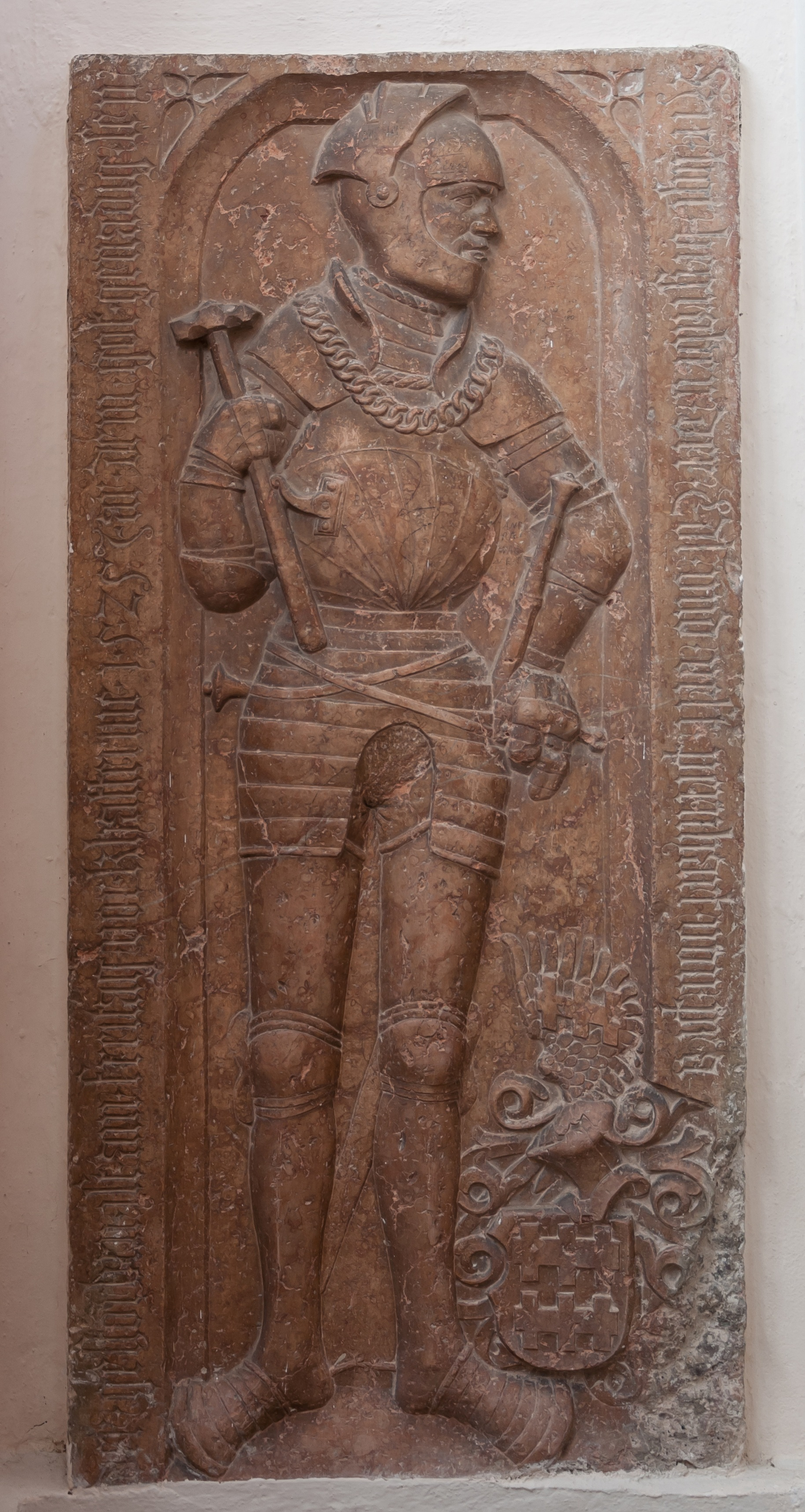 Hinter der westlichen Eingangstür der Kath. Pfarrkirche hl. Johannes d. T. in Sankt Johann ob Hohenburg befindet sich die Grabplatte des Pernhart von Pranckh.